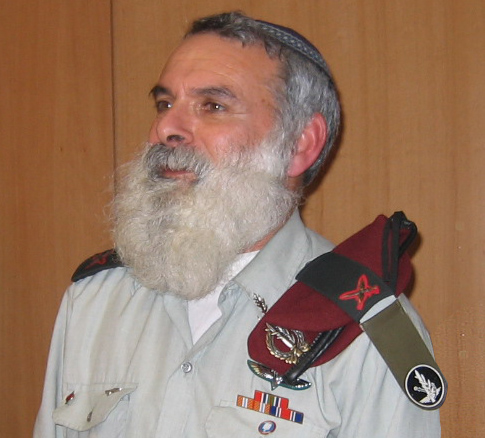 Depicted person: Avichai Rontzki – Israeli general